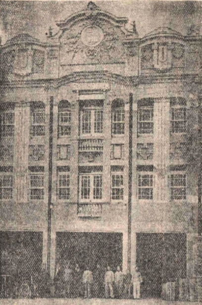 五福商店，位於台南市西門町四丁目27番地